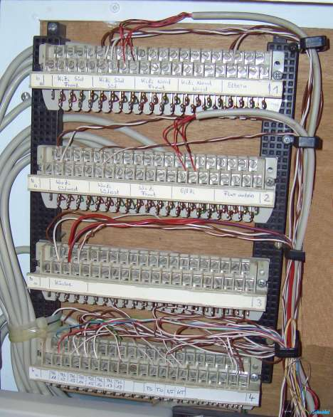 Telefonverteiler älterer Ausführung; gewachsene (etwas unordentliche) Verschaltung